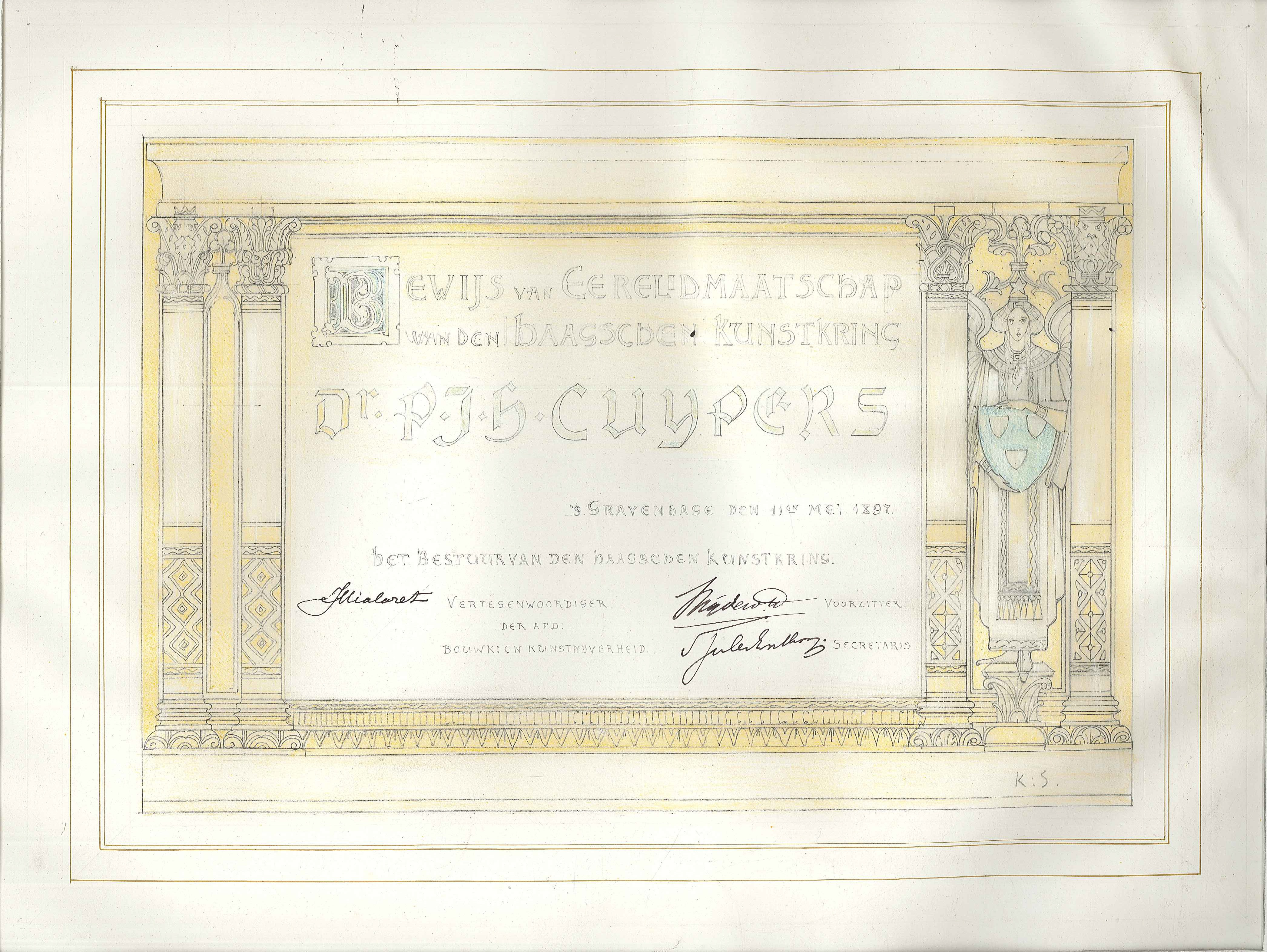 Bewijs van Eerelidmaatschap van den haagschen kunstkring Dr. P.J.H. CUYPERS. Potlood en inkt op papier (?). 44.4 × 36.8 cm (17.4 × 14.4 in). Roermond, Cuypershuis.